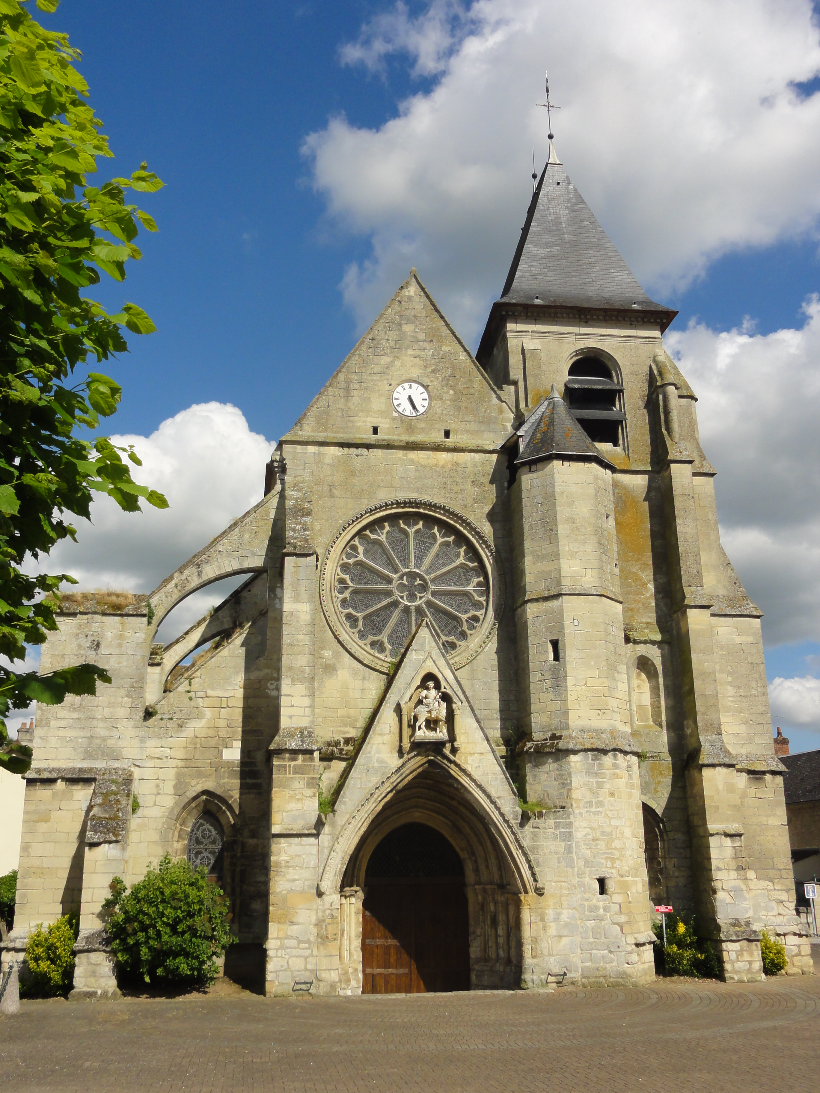 Façade occidentale.